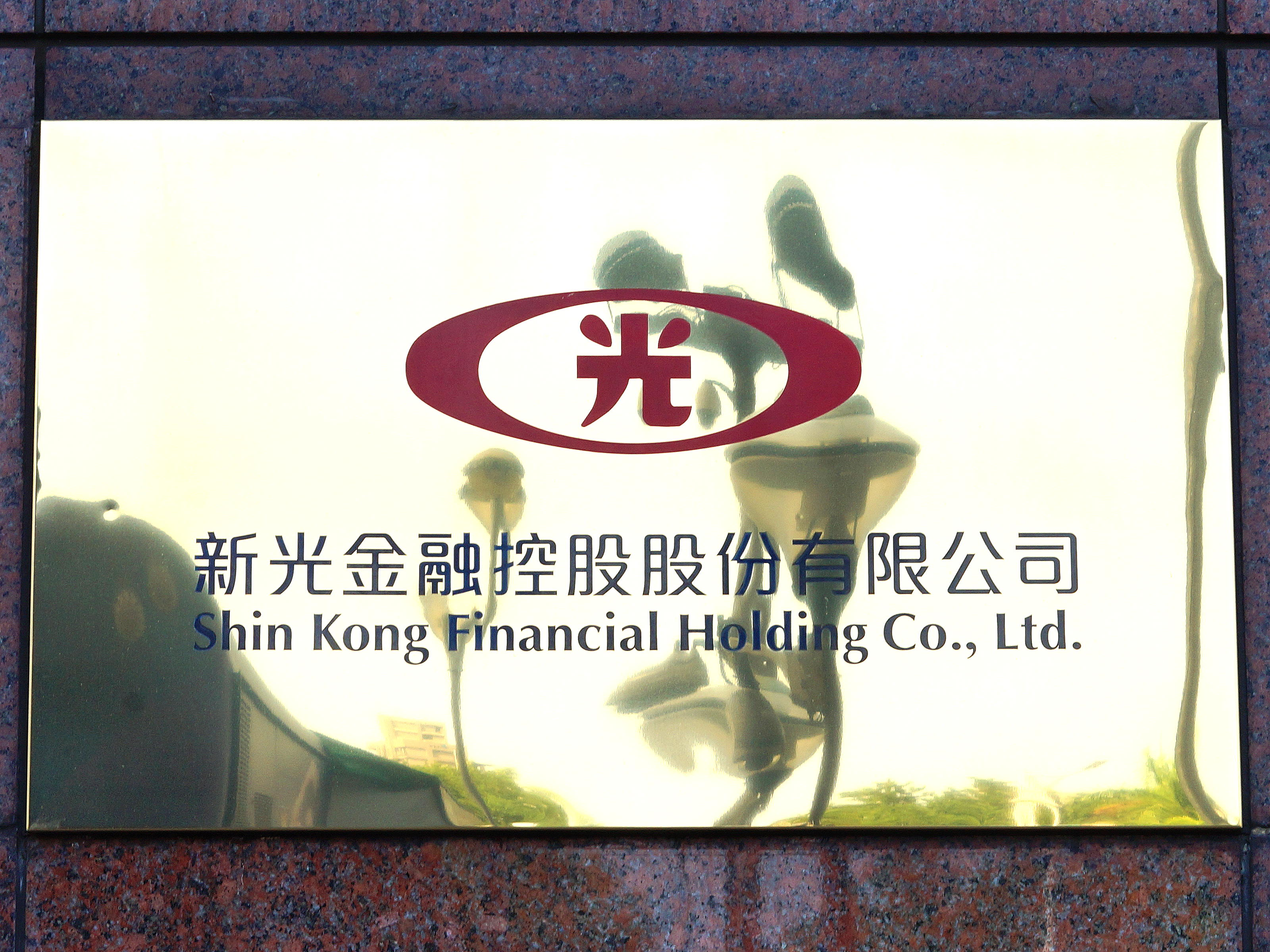 新光人壽保險摩天大樓大門右側，新光金融控股公司銘板。